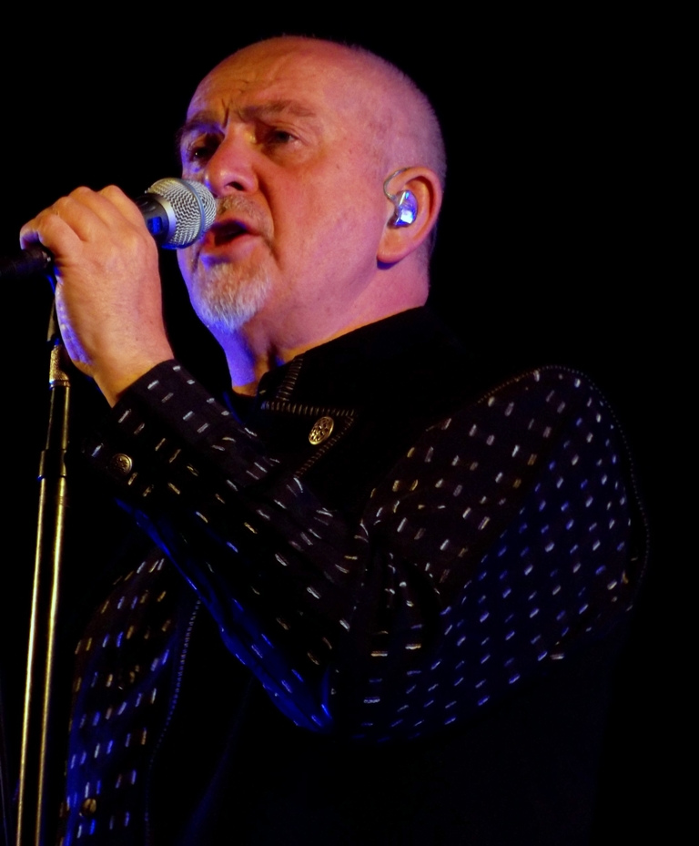 Zdjęcia zrobione podczas III Life Festival w Oświęcimiu.